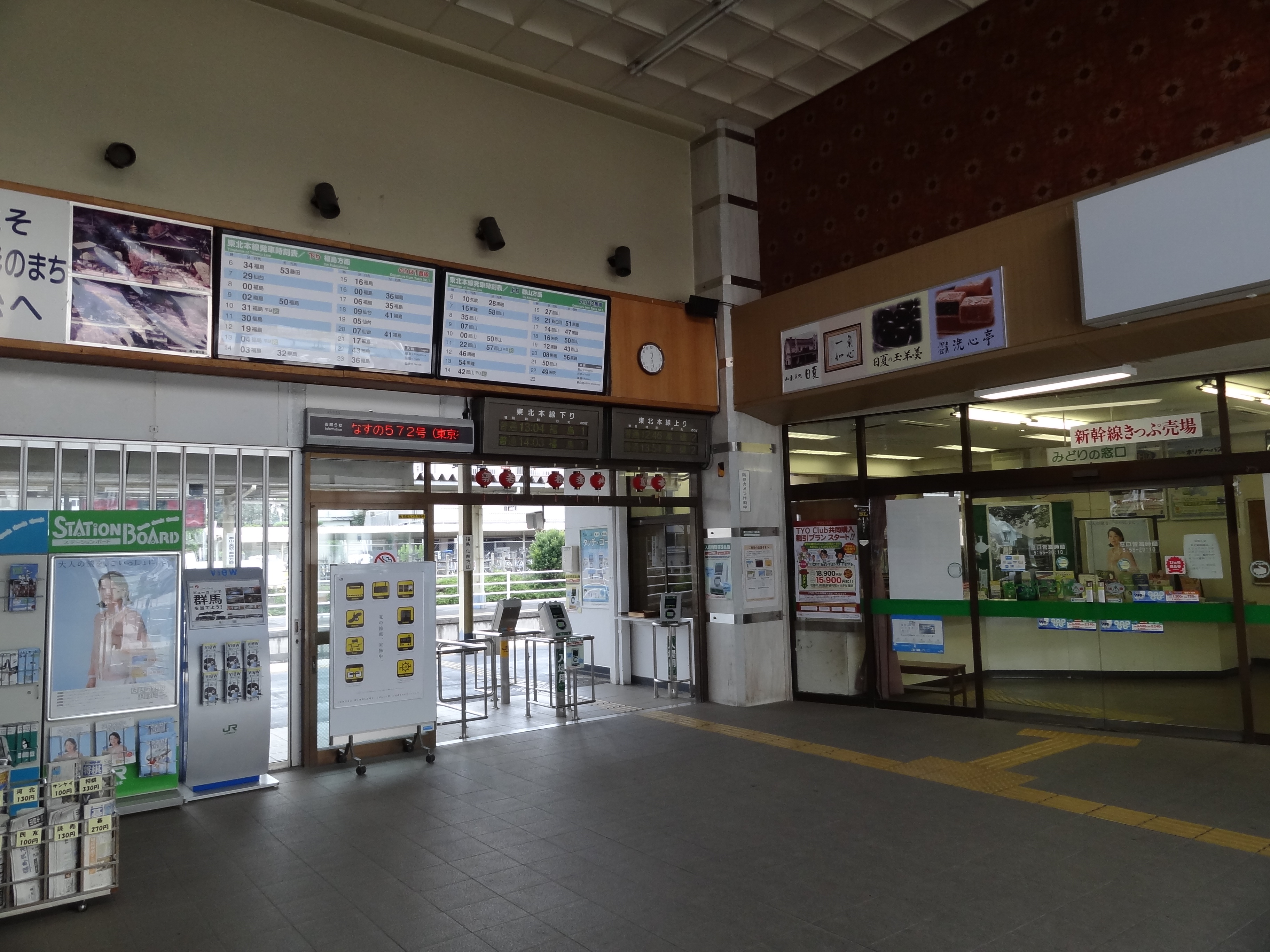 二本松駅舎内